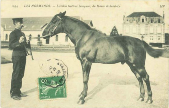 L'étalon trotteur Anglo-normand Narquois (1891 - 1911) présenté tenu en main au Haras national de Saint-Lô